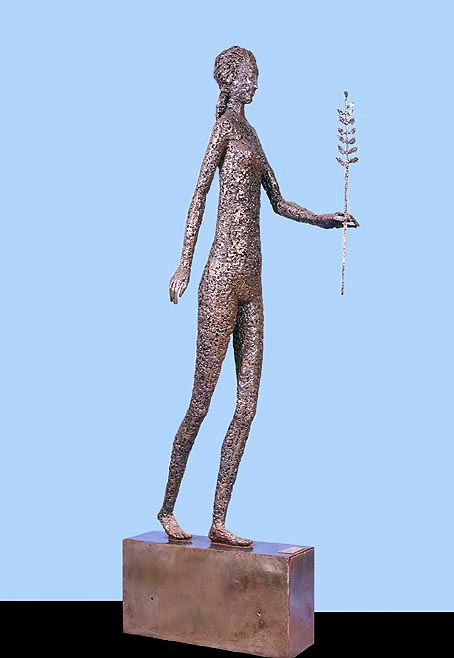 Femme debout tenant un rameau, sculpture en soudure par Enrico Campagnola.